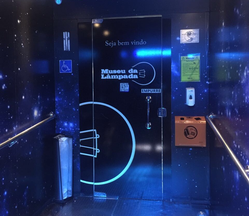 Porta de entrada para o museu após atravessar o portão principal.